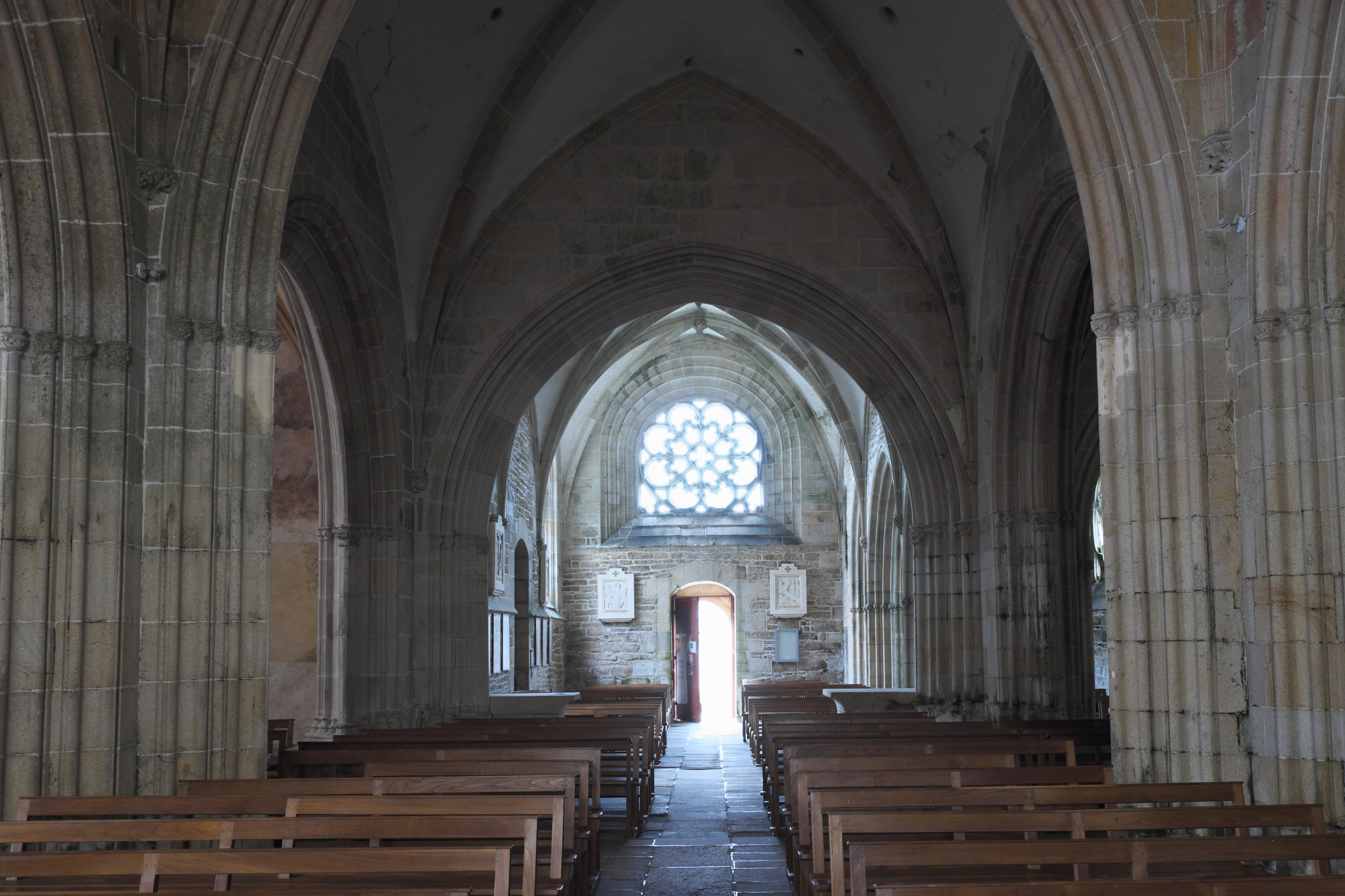 Katholische Kirche Notre-Dame in Kernascléden im Département Morbihan (Region Bretagne/Frankreich), Innenraum